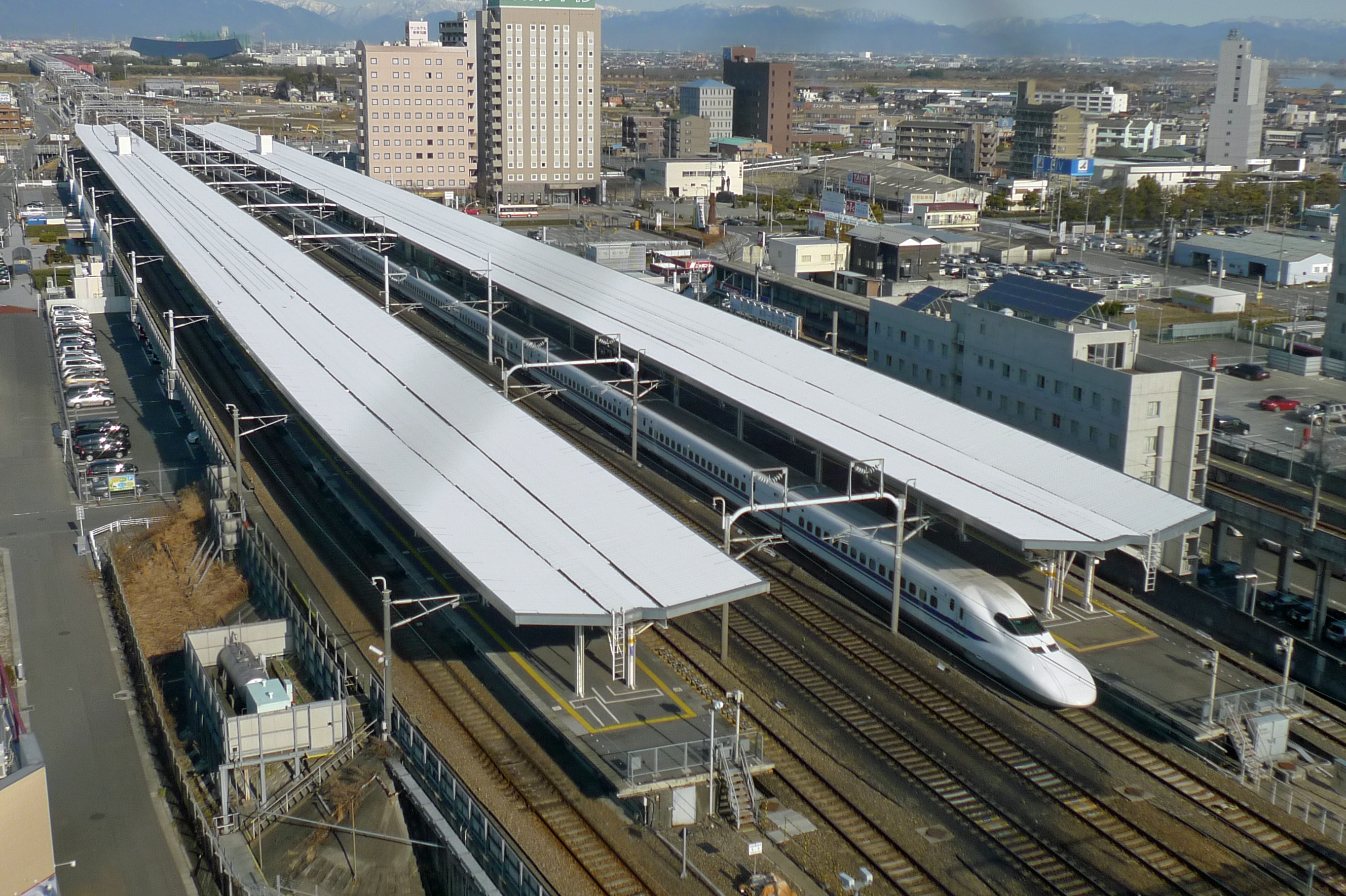 「東横イン岐阜羽島駅新幹線南口」望む朝の岐阜羽島駅